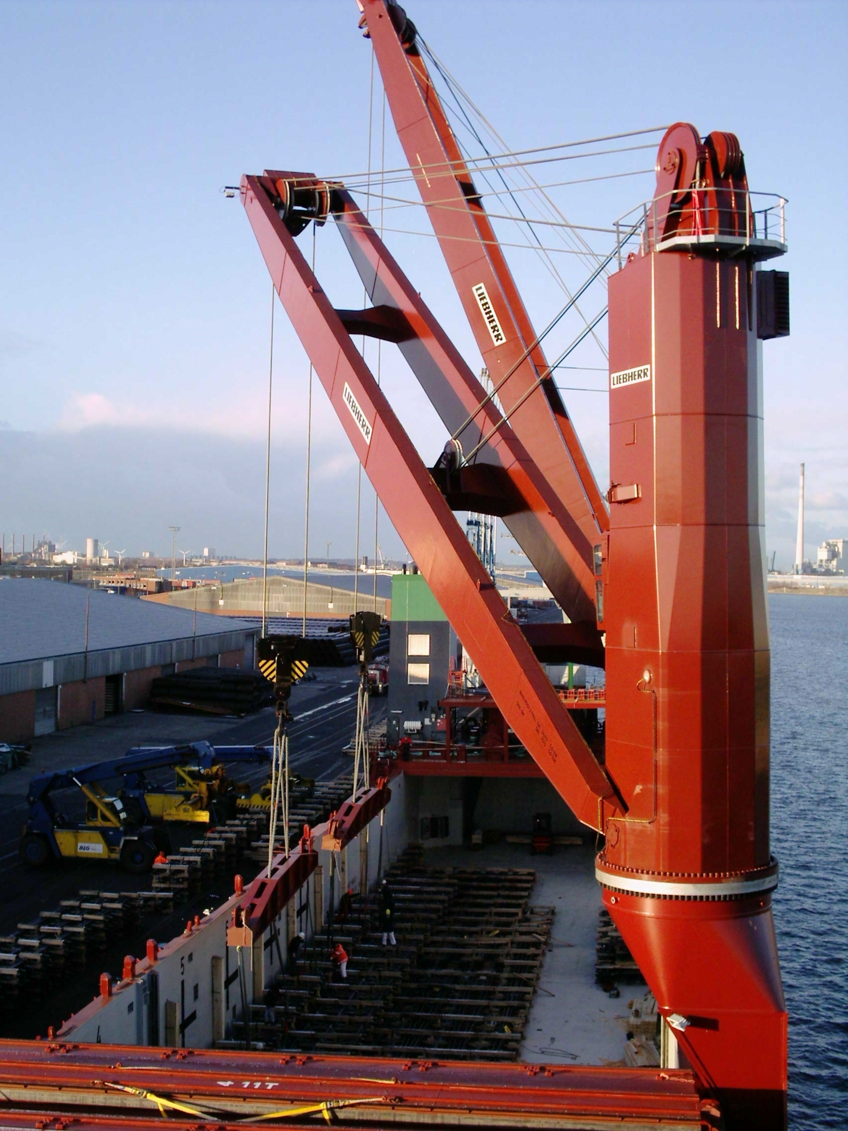 SWL 240mt Schwergutkran